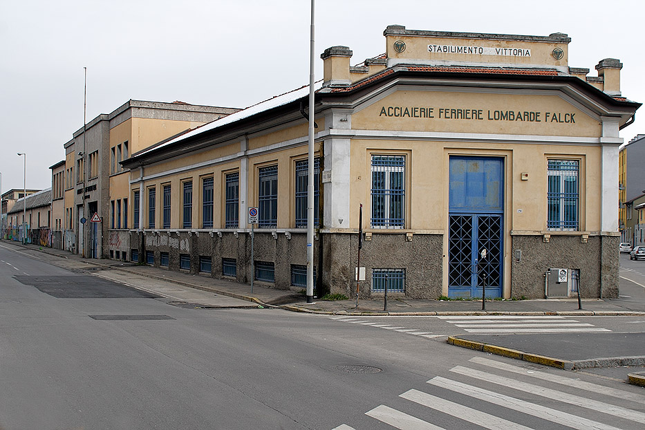 Comparto Concordia area ex-Falk This is a photo of a monument which is part of cultural heritage of Italy.